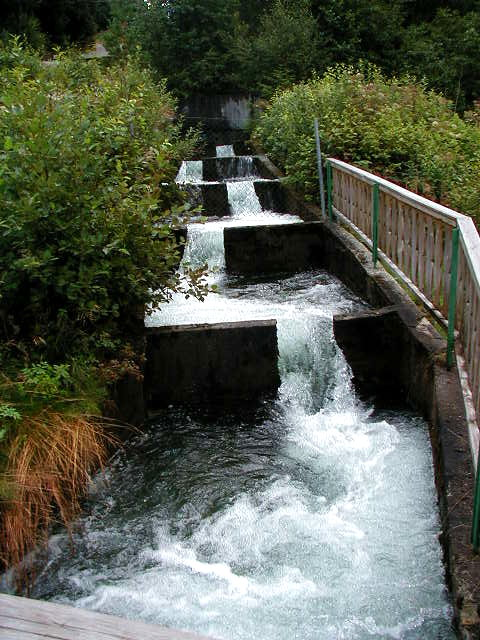 Laksetrappa i Eidsfossen